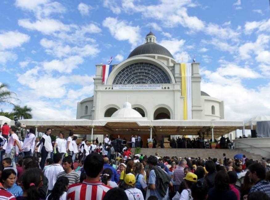 Vista de la Basílica de Caacupé antes de la misa oficiada por el Papa Francisco, el sábado 11 de julio de 2015.